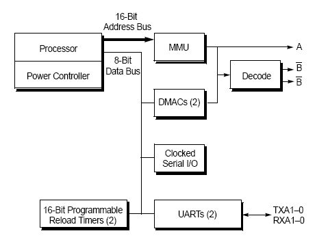 Z180 Übersichtsdiagramm